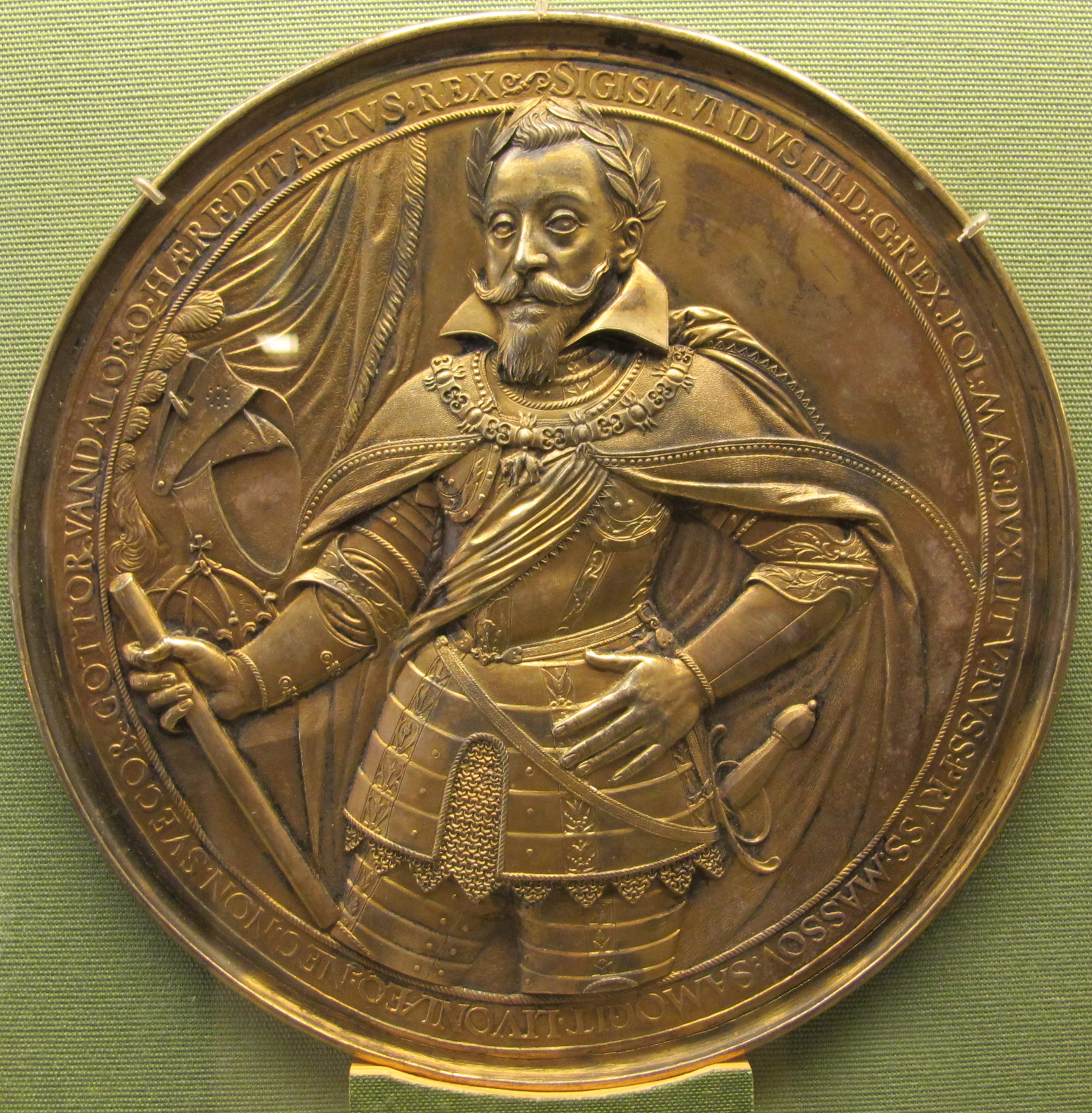 Ignoto, sigismondo III di polonia, arg dorato, 1611